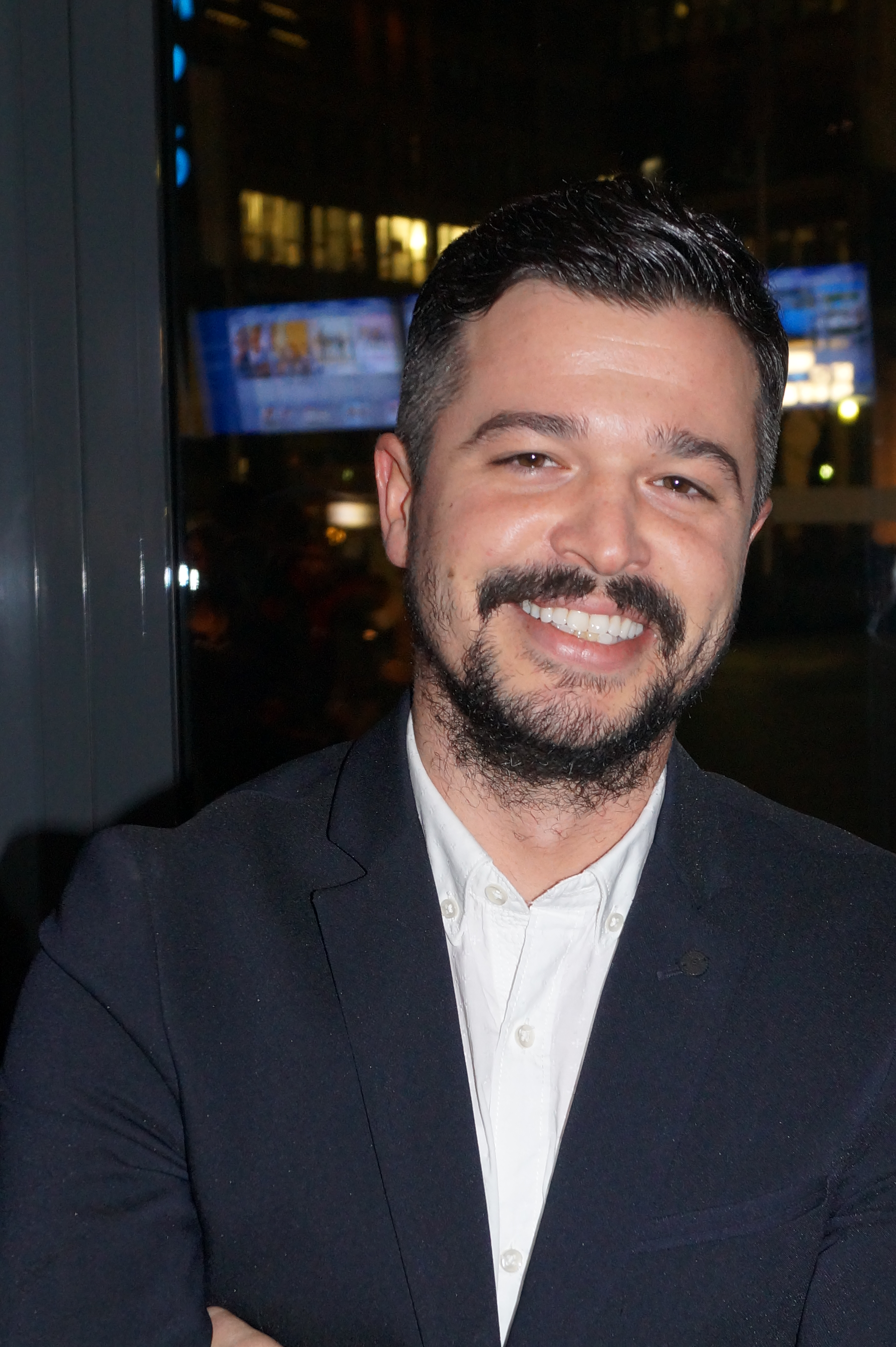 Olgu Caglar bei der Premiere von "Son Mektup", im Cinedom Köln, am 19. März 2015